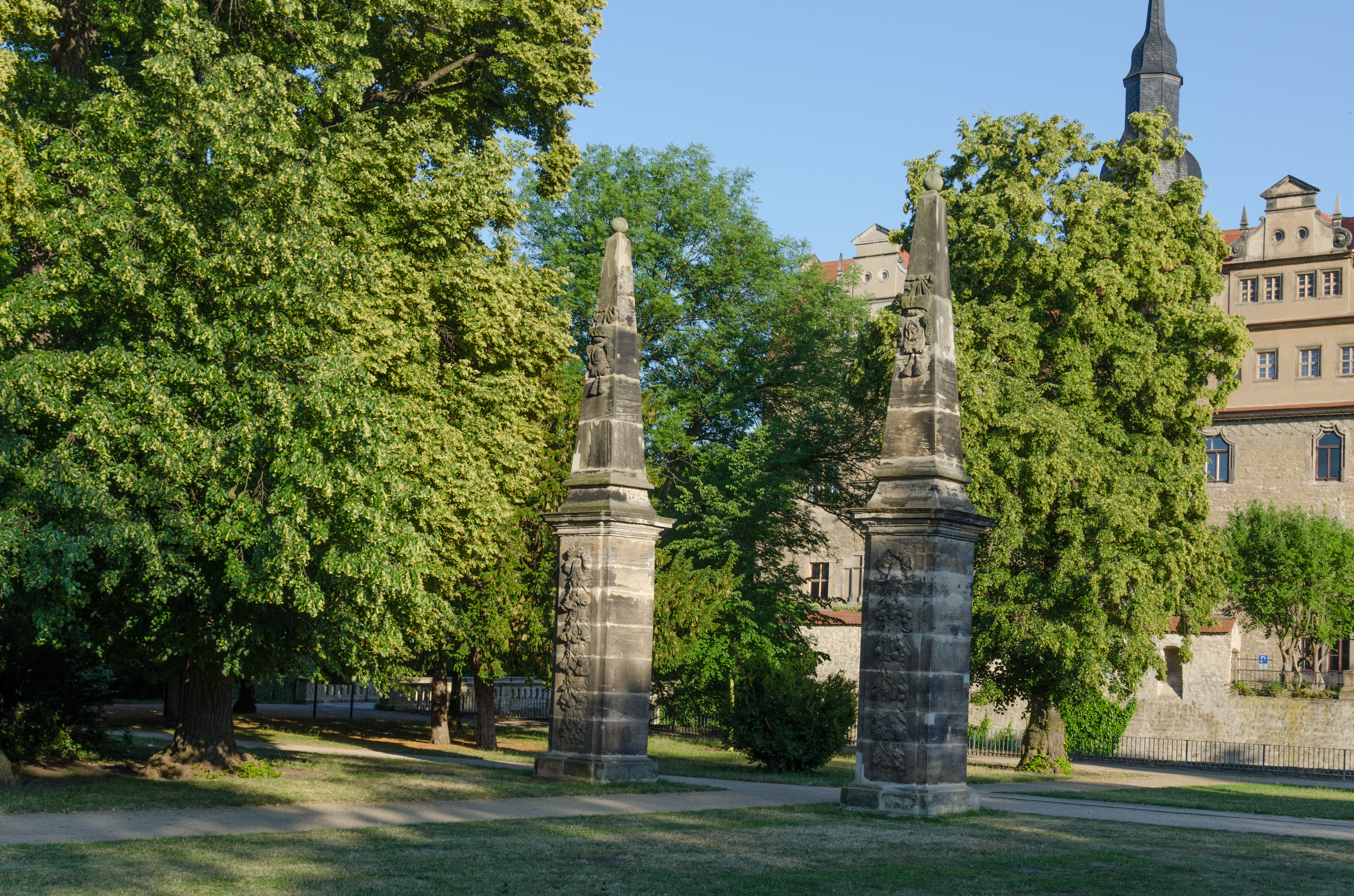 Merseburg, Oberaltenburg, Schloßgarten, Obelisken